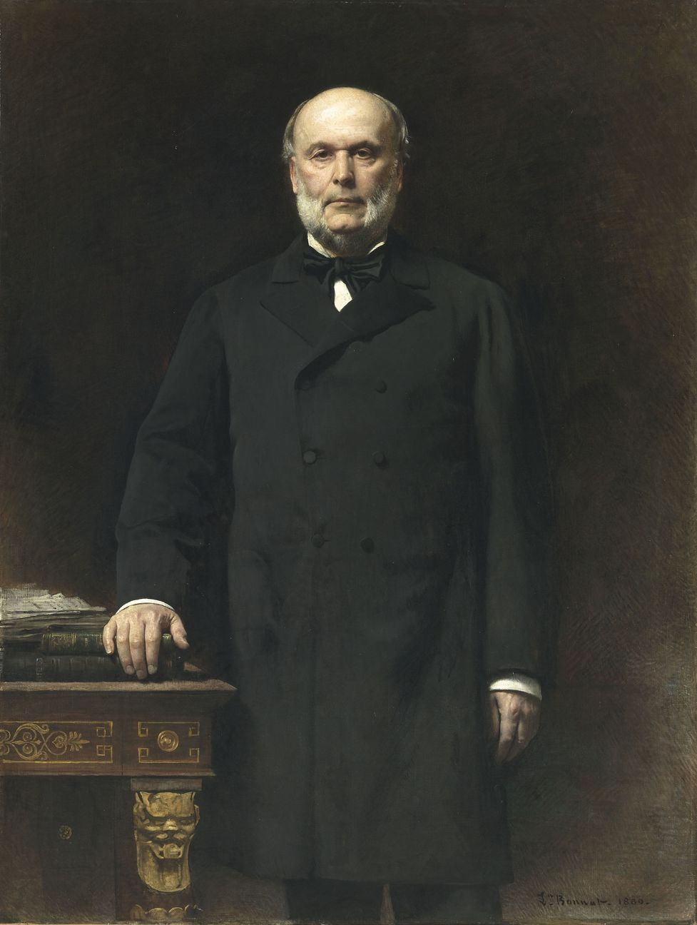 Jules Grévy (1807-1891), avocat et homme d'État français, président de la République de 1879 à 1887.